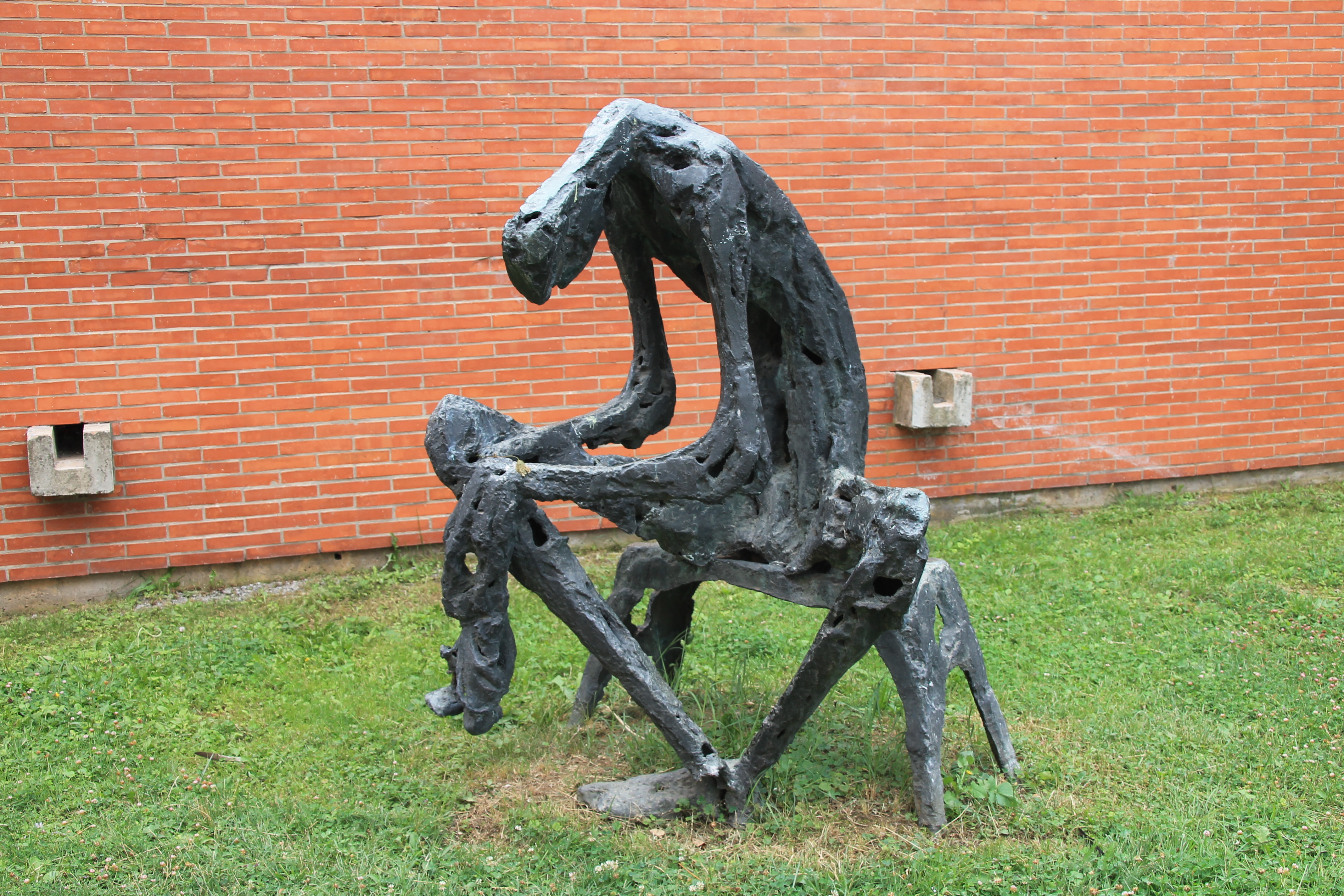 Spomen muzej 21 oktober